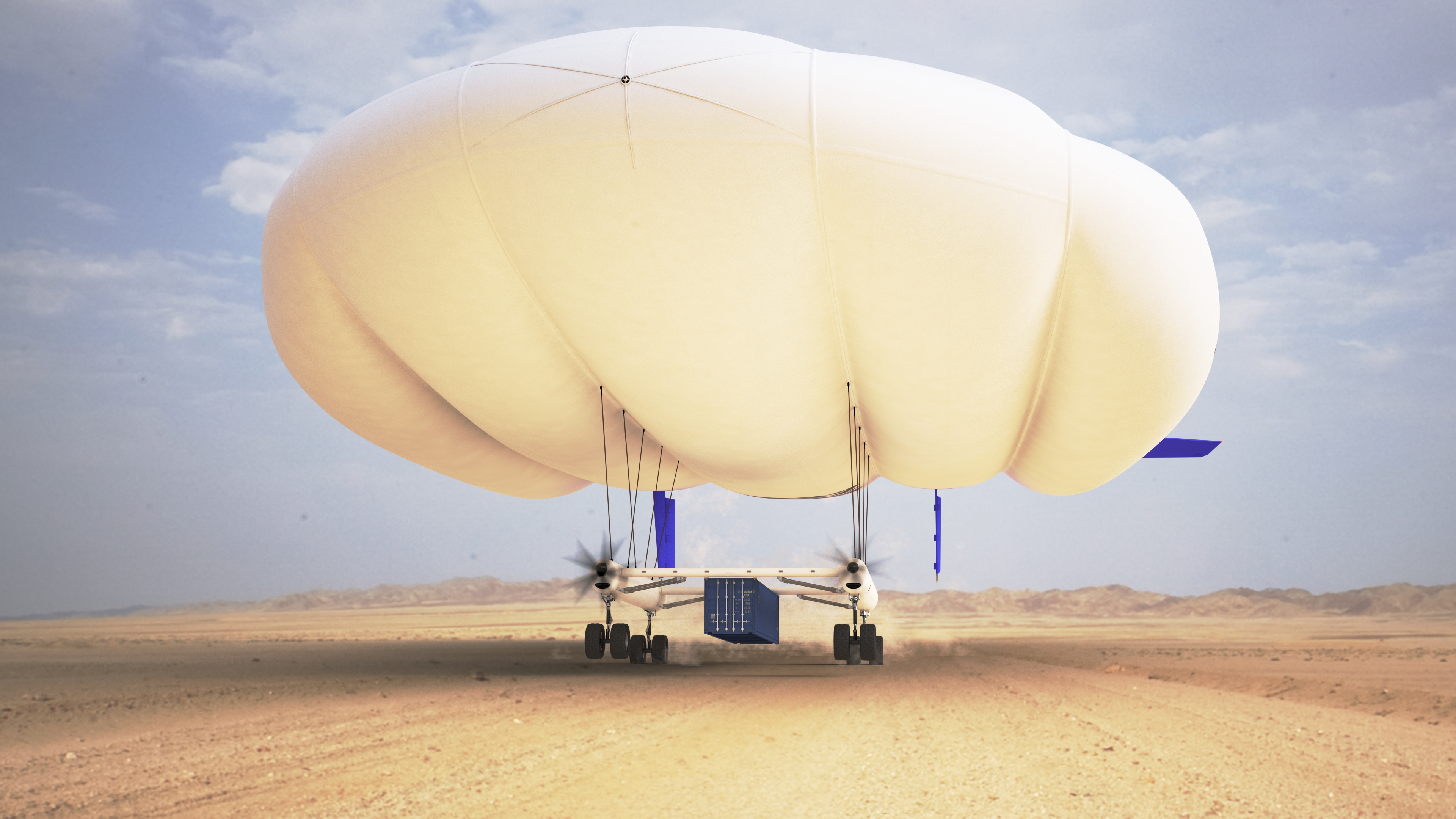 Décollage du NATAC dans le désert